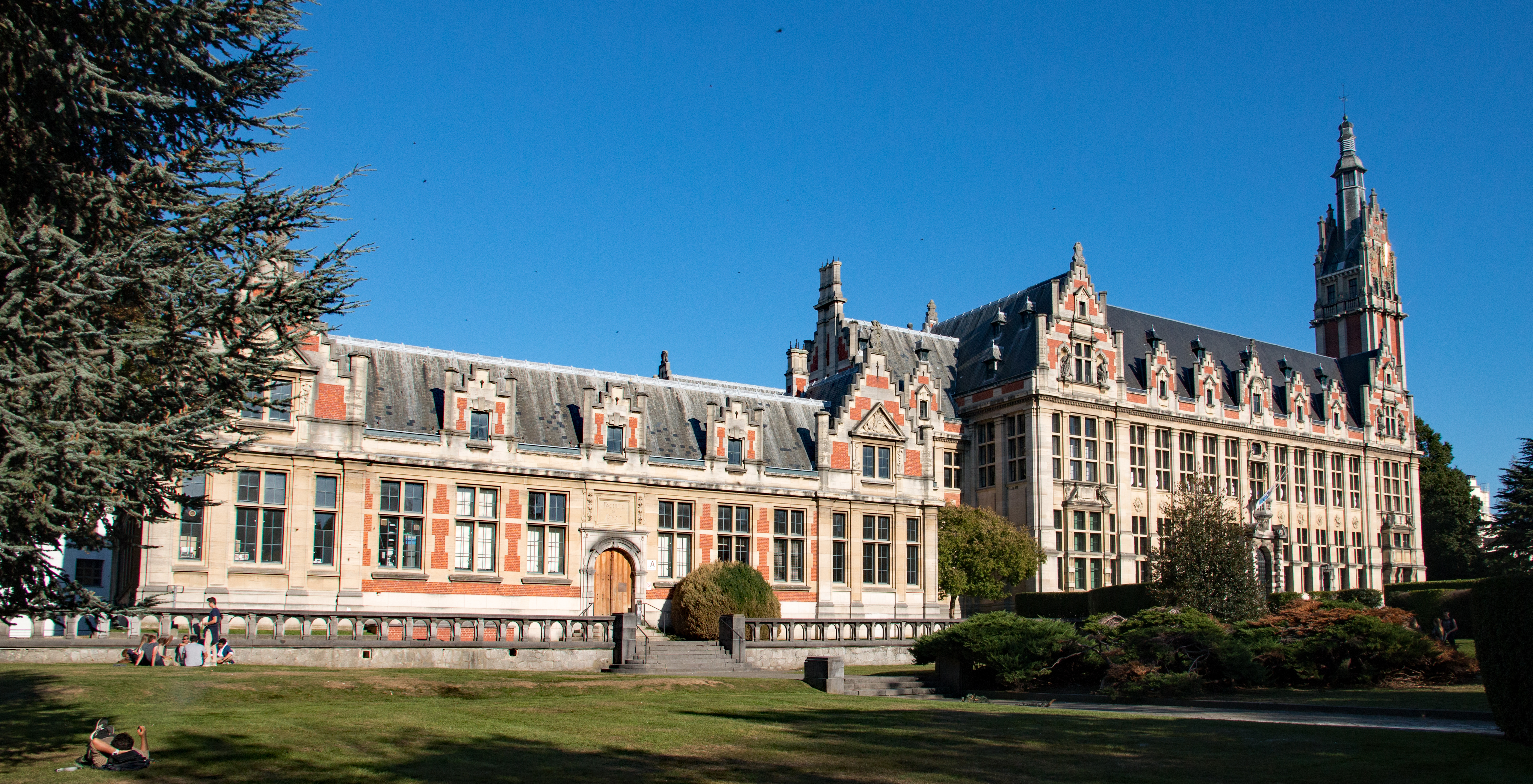 Université Libre de Bruxelles Franklin Rooseveltlaan Brussel This photo of immovable heritage has been taken in the Brussels Capital Region